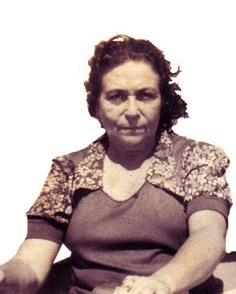 Maria Mariá, anos 70